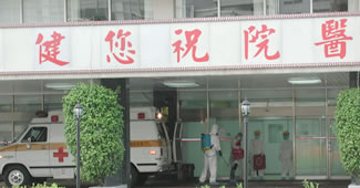 SARS事件期間的臺北市立和平醫院。